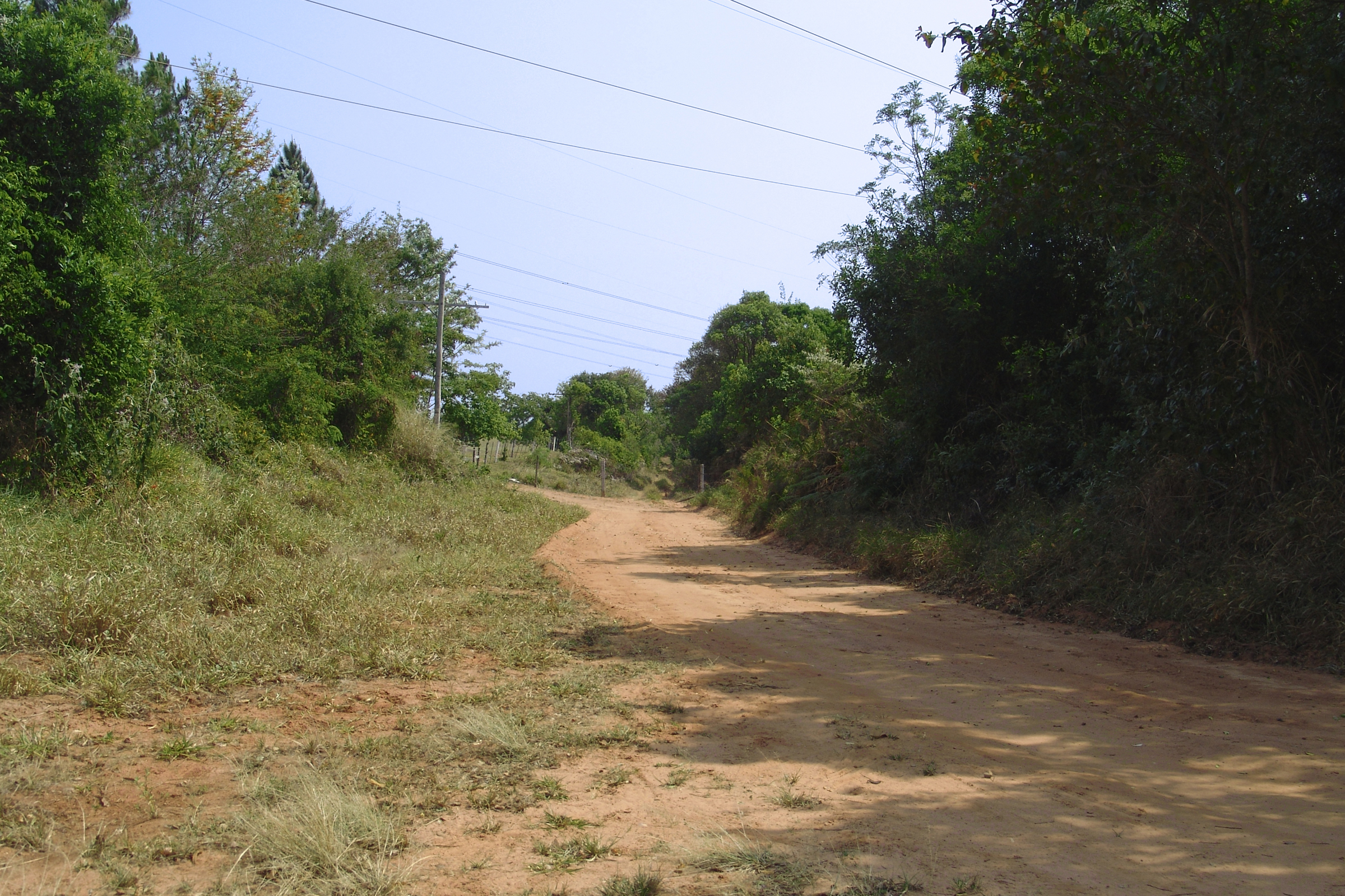 Rodovia do estado de São Paulo, SP-251 (Chico Landi), Avaré, São Paulo, Brasil